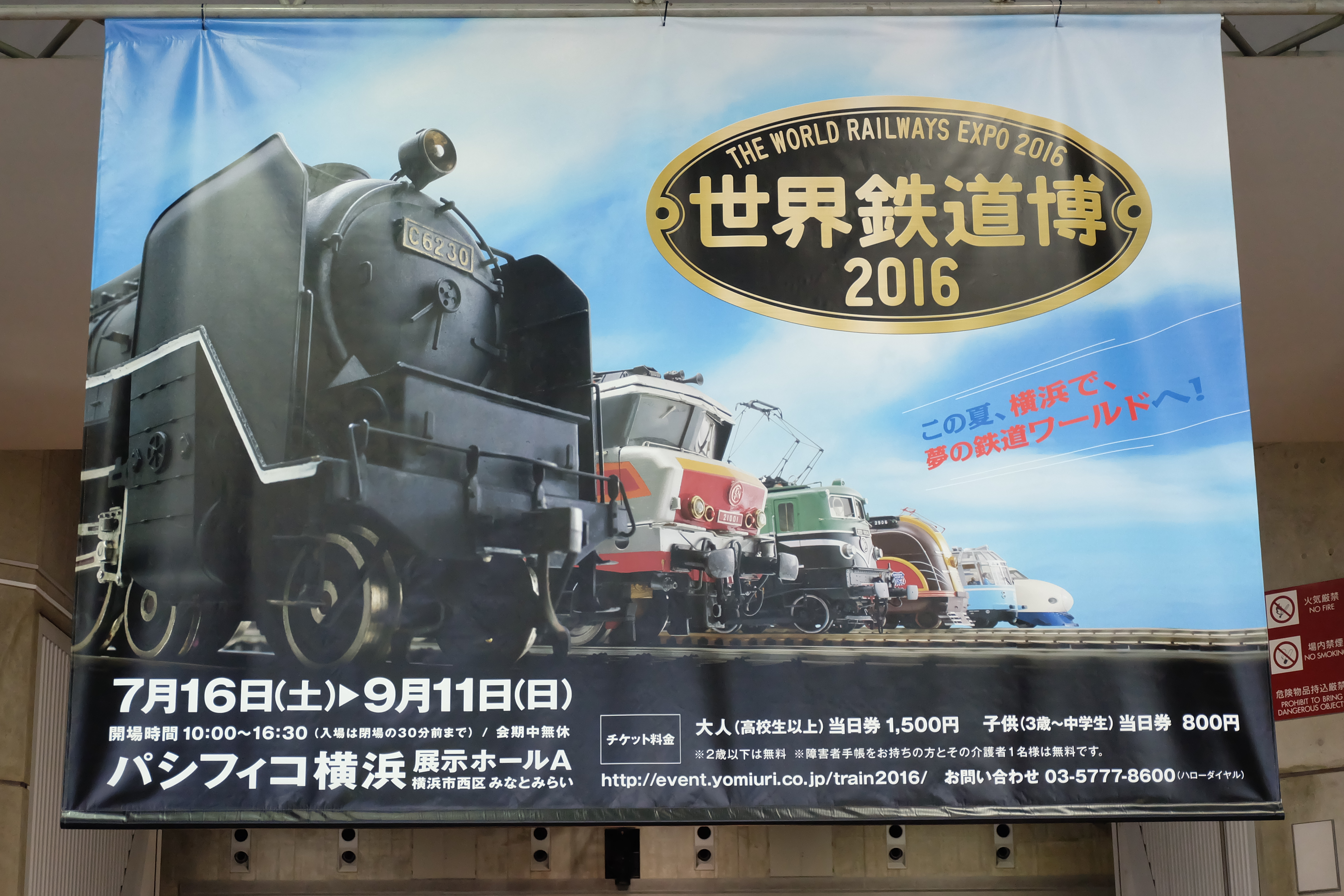 世界鉄道博2016 入り口前のタペストリー